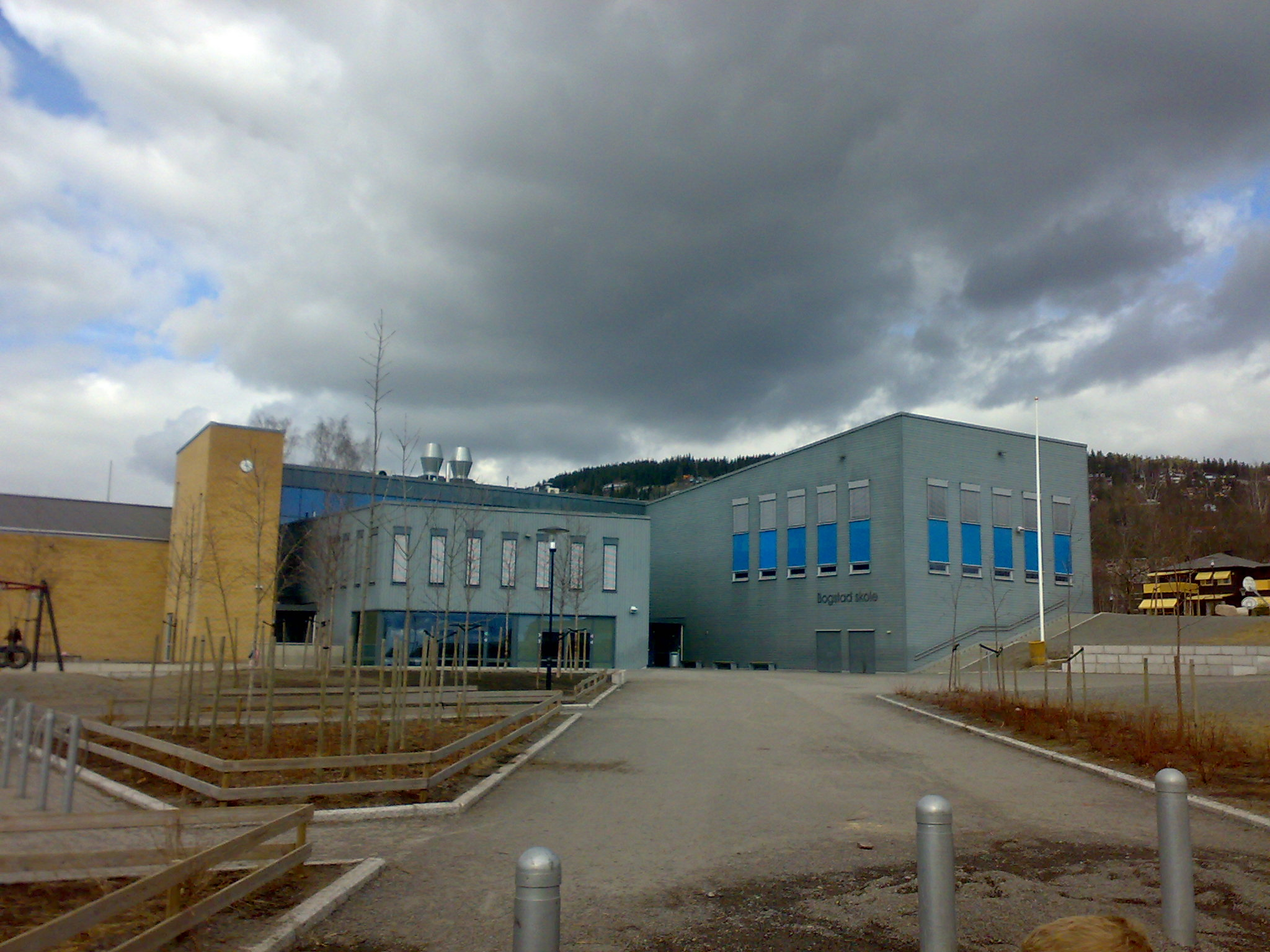 Bogstad skole school, Oslo